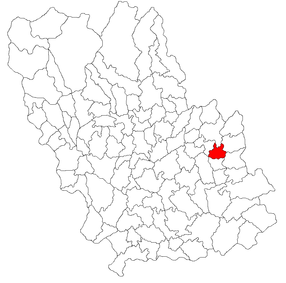 Categorie:Hărţi ale judeţului Prahova